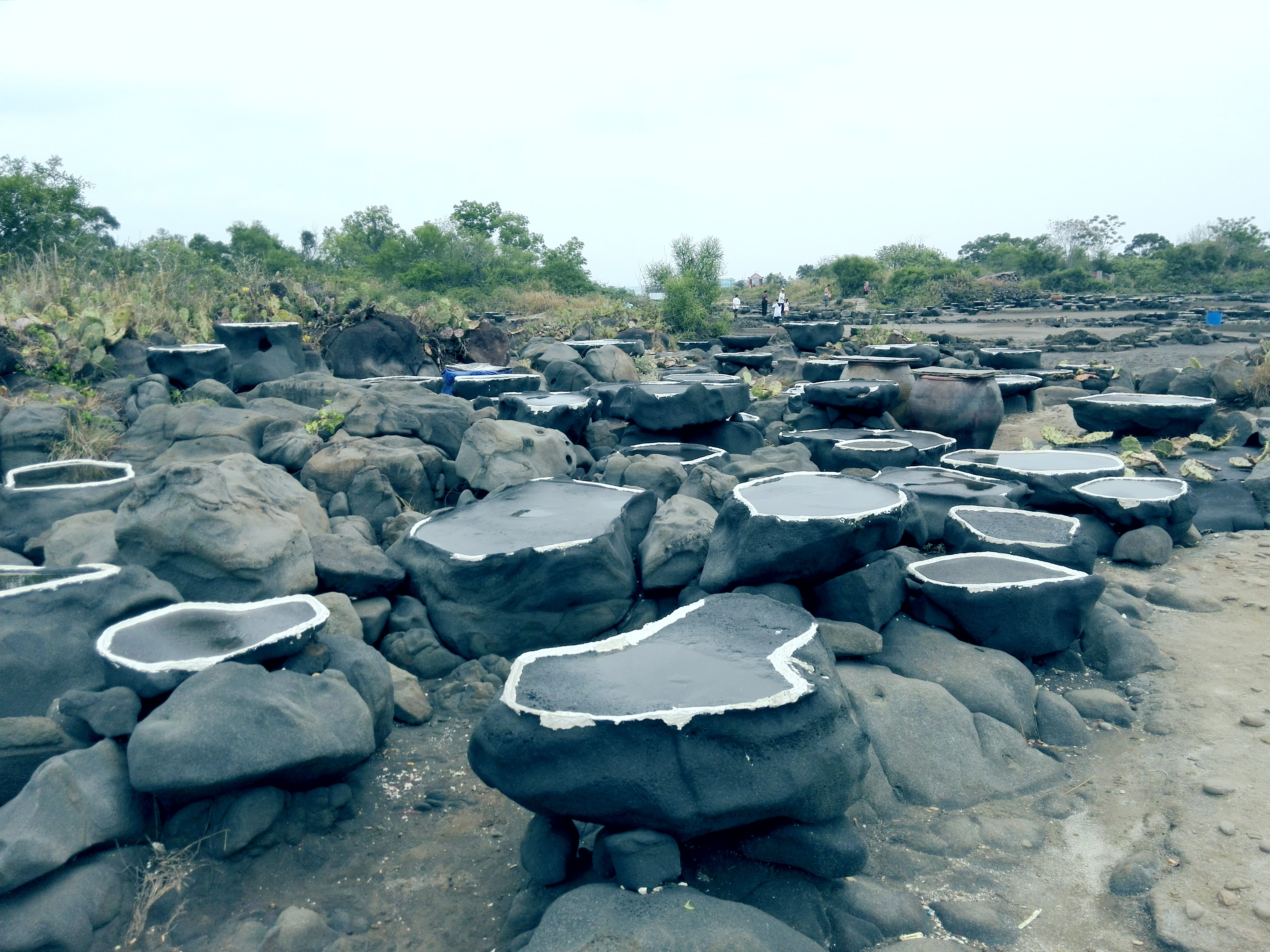 海南国际旅游岛——洋浦古盐田景观（西南向）